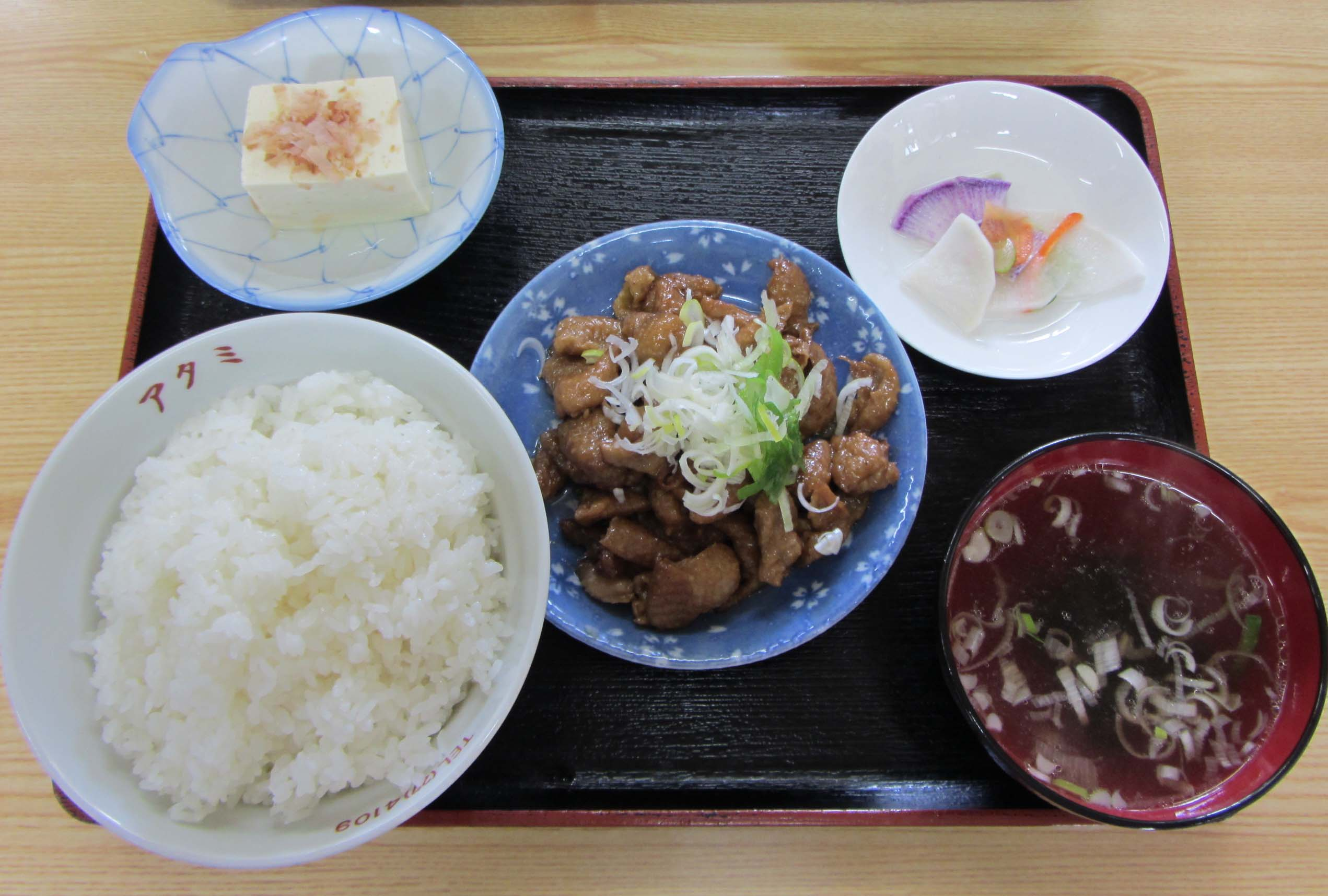 塩川の鳥モツ定食